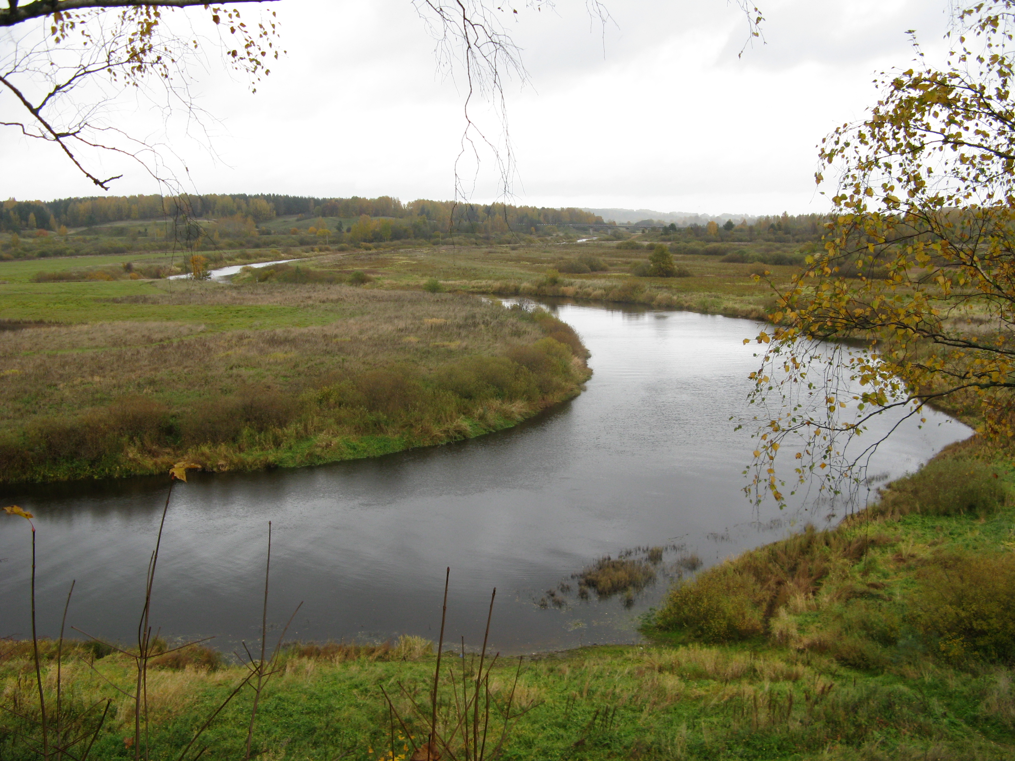 Вид на долину Сороти из Тригорского